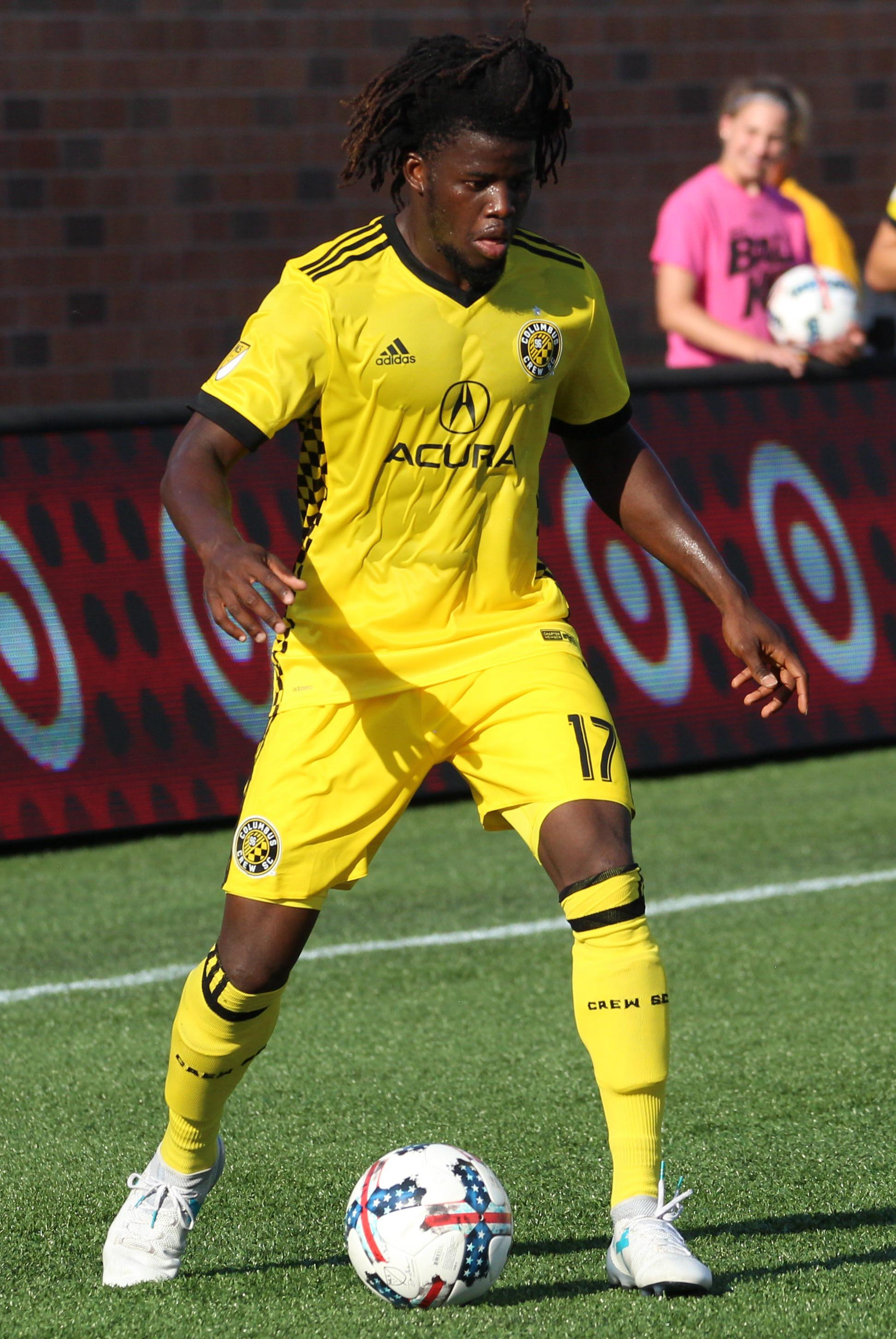 Lalas Abubakar - Ghana - COlumbus Crew - MLS - MN United _ Abu Danladi